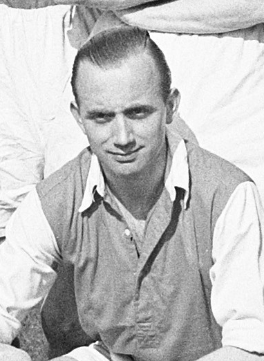 Henk van der Linden.